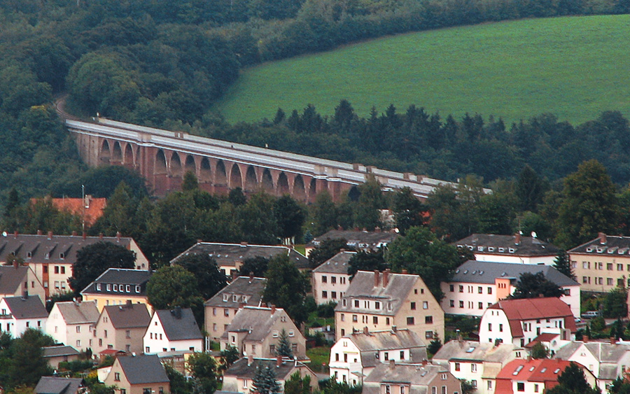 Göltzschtalbrücke vom Kuhberg (bei Brockau) aus gesehen